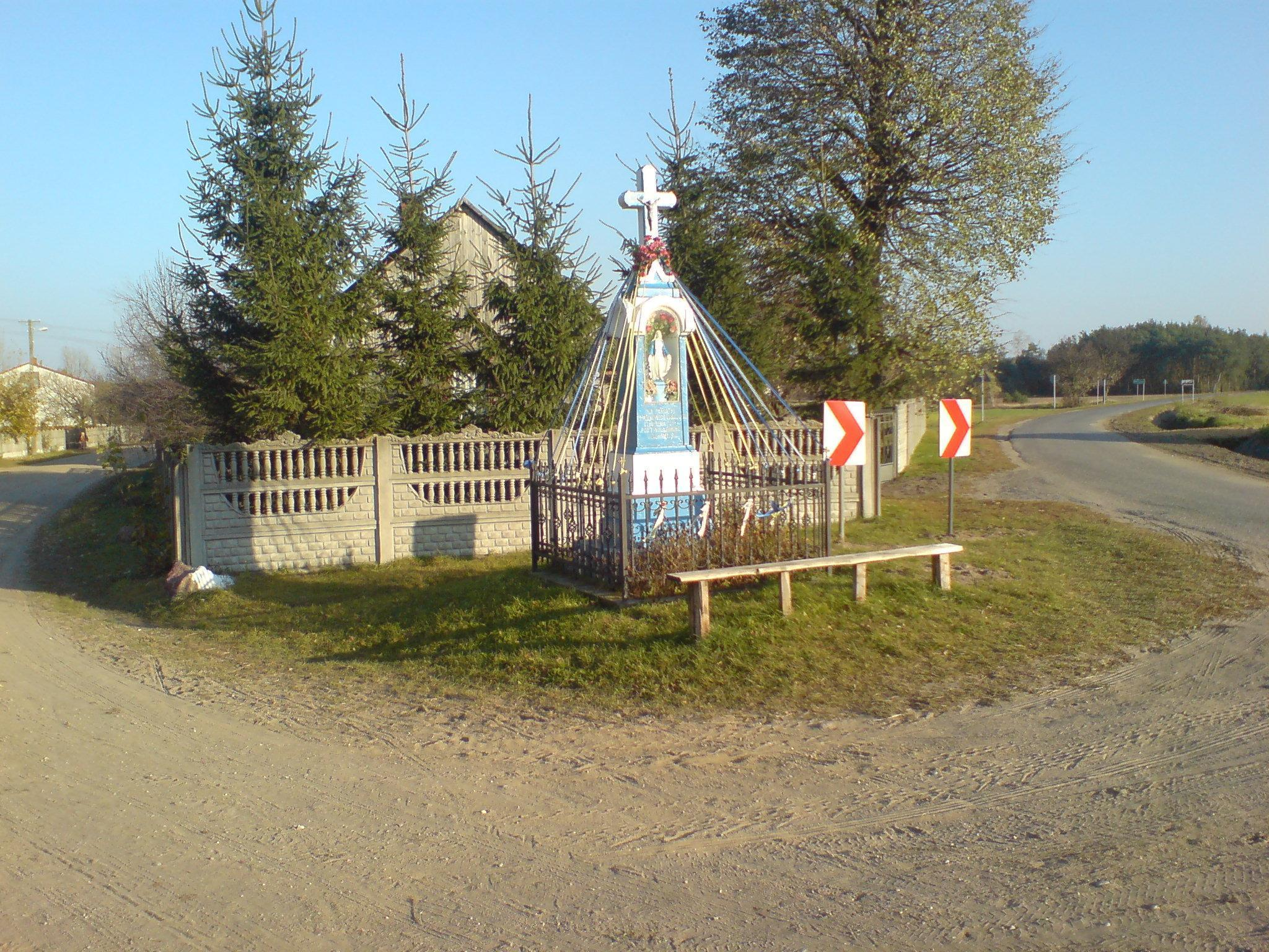 To jest kapliczka ufundowana przez myśliwych polujących na polach Międzyborza.